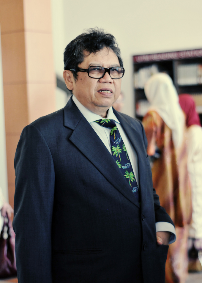 Datuk Lat